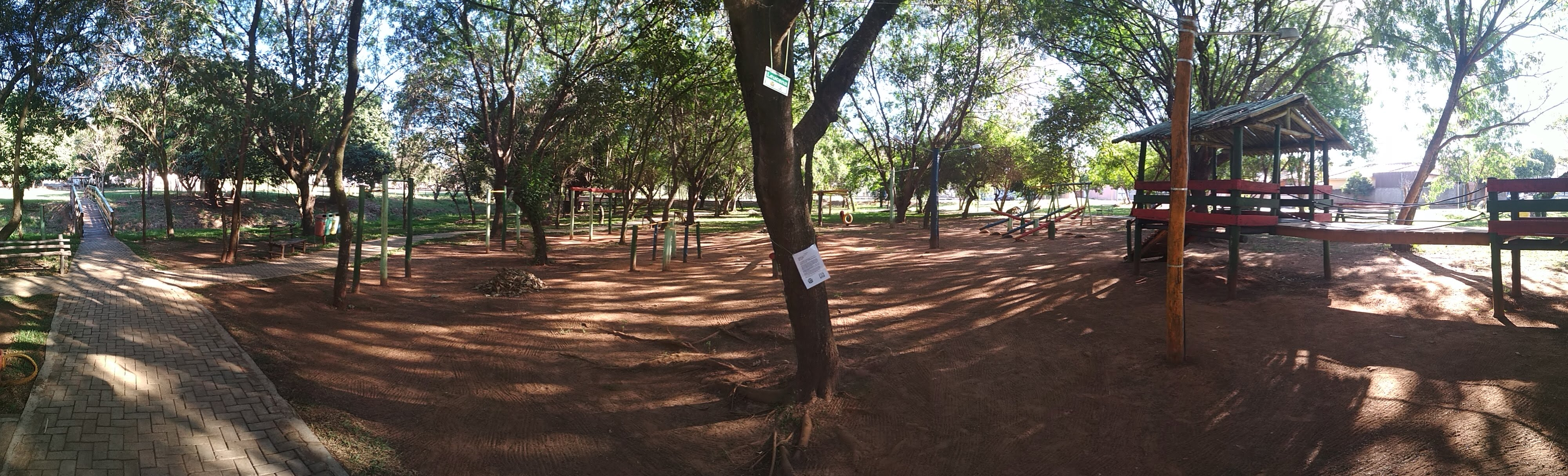 Panorâma central do Bosque Dona Lucinha